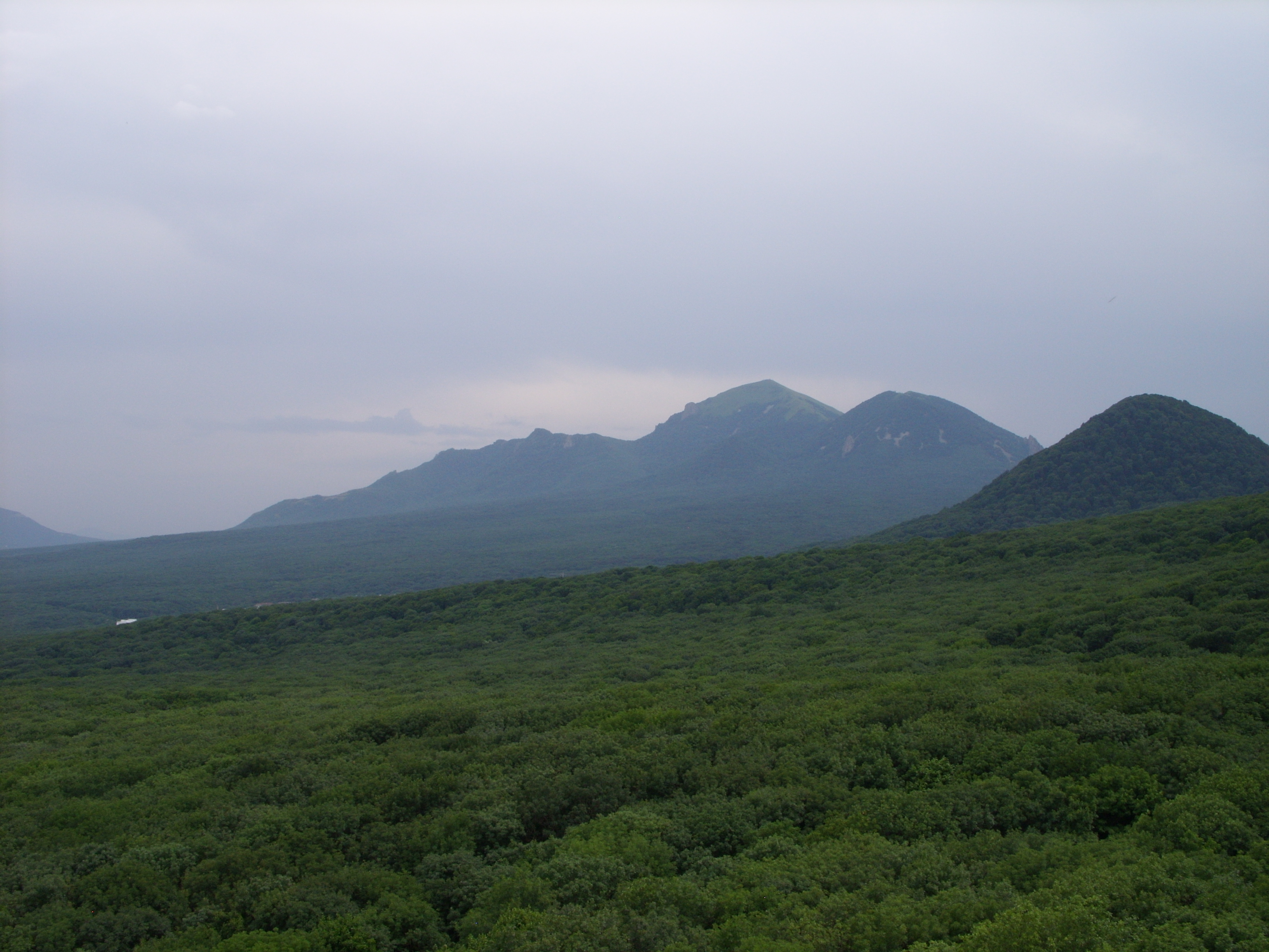 снимок июля 2009 г.